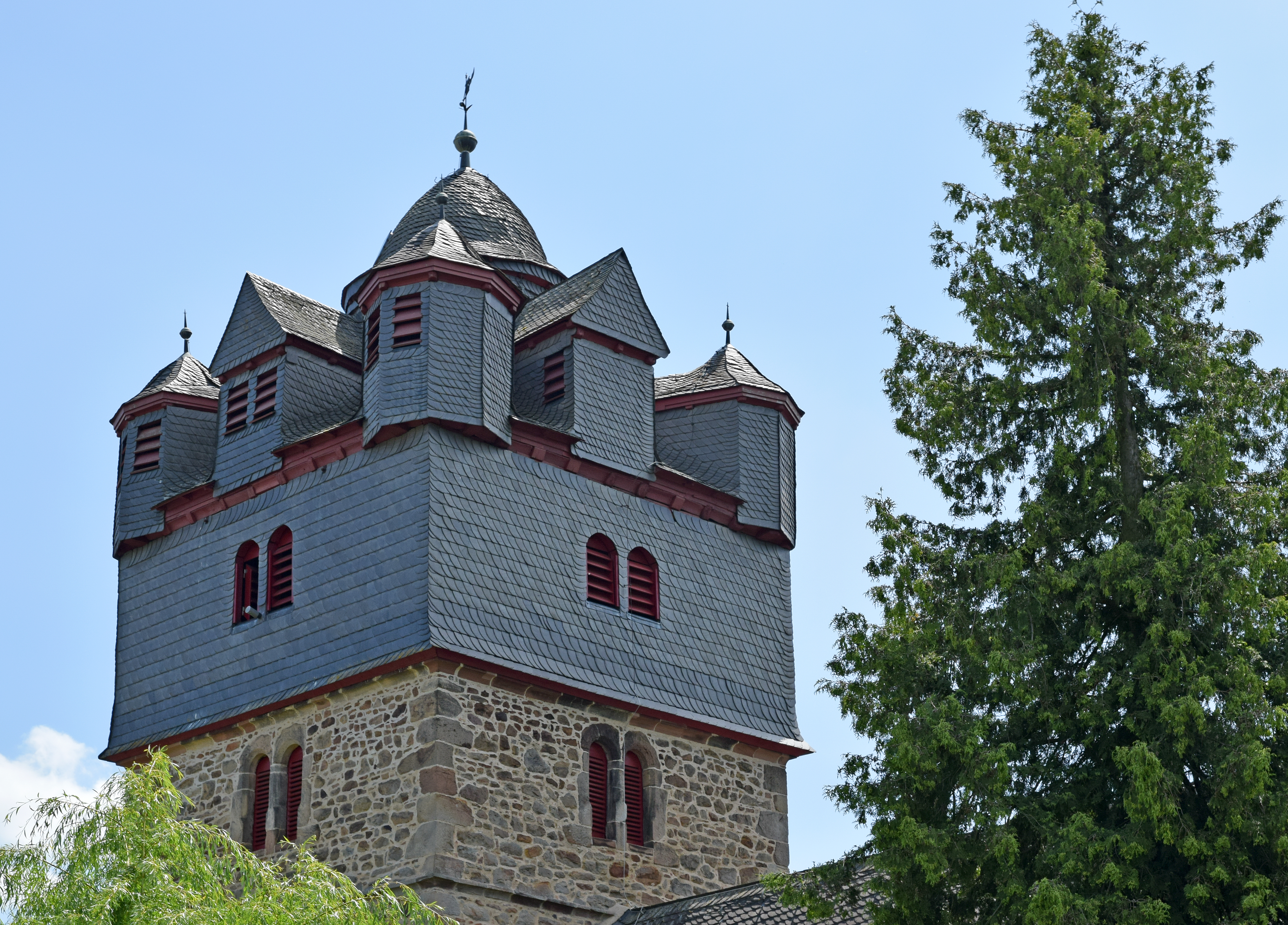 Turmkuppel der evangelischen Kirche in Fronhausen